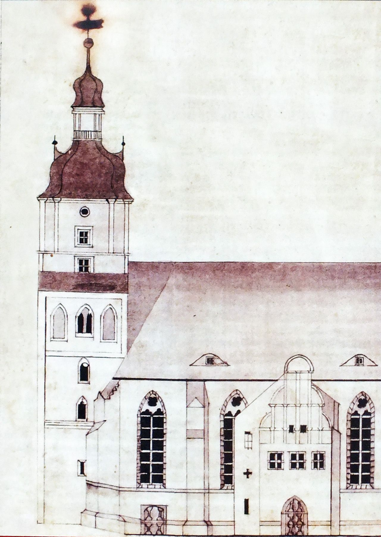 Hinweistafel auf den Vorgängerbau am Turm der Stadtkirche St. Marien in Kemberg